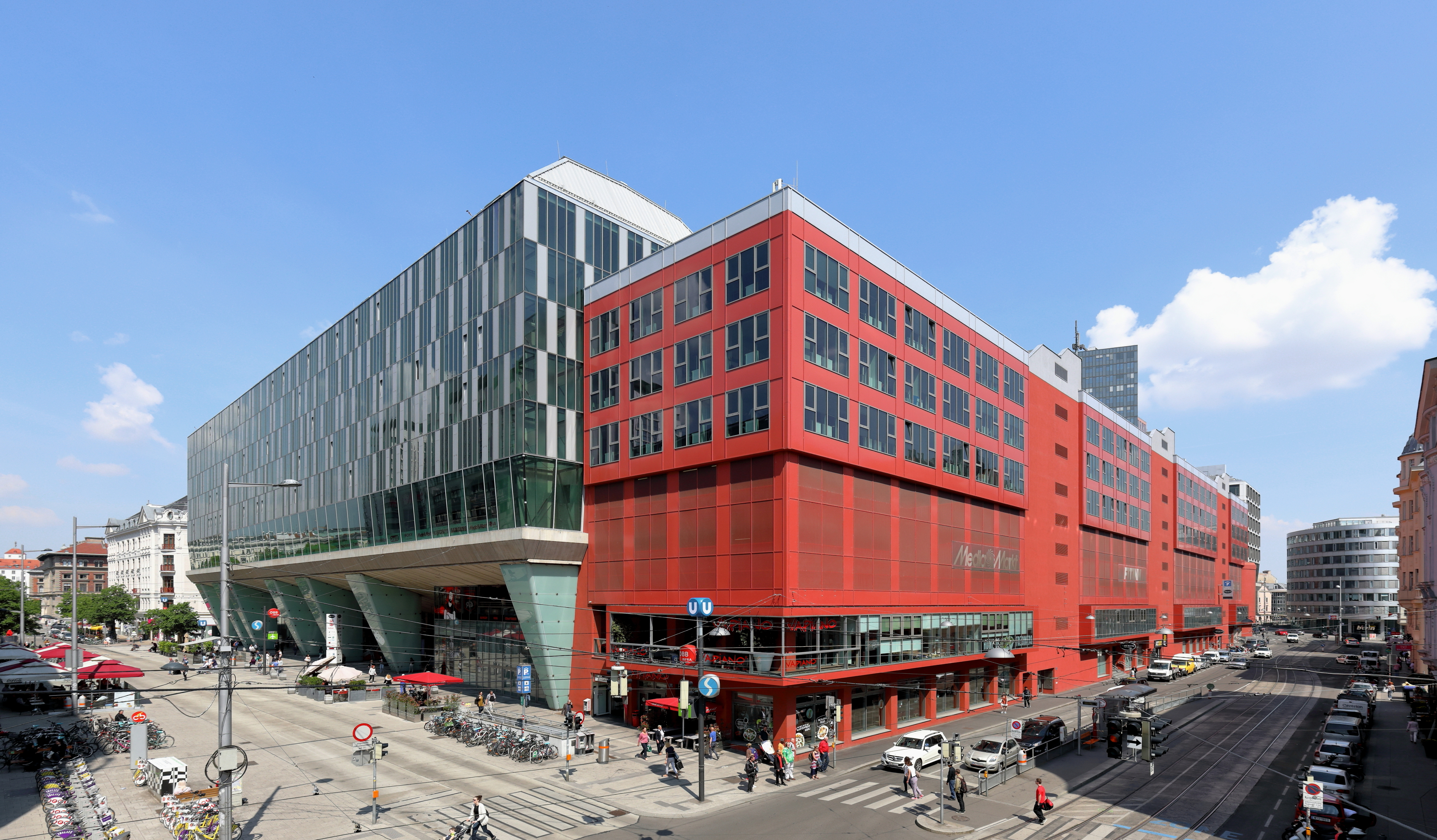 Südansicht des Bahnhofkomplexes Wien Mitte im 3. Wiener Gemeindebezirk Landstraße.Nach jahrelangem Hin und Her wurde das Projekt von 2007 bis 2013 realisiert (1. Teileröffnung am 8.11.2012). Es handelt sich um die Überbauung des Bahnhofs Wien-Mitte, in dem zwei U-Bahn- und fünf Schnellbahnlinien sowie der CAT halten. Dabei wurde nach den Plänen der Architektenteams Ortner & Ortner (Manfred Ortner, Laurids Ortner) und Neumann + Steiner (Heinz Neumann, Eric Steiner) mit einem Gesamtinvestitionsvolumen von etwa 480 Millionen Euro ein Gebäudekomplex mit einem 70-Meter-Hochhaus mit 17 Stockwerken, sowie ein Shoppingcenter mit 30.000 m² Fläche und Parkdecks mit 500 Stellplätzen errichtet.